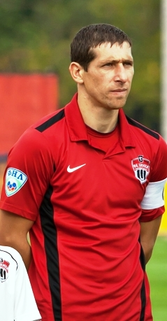 Сергей Мирошниченко в составе «Химок»